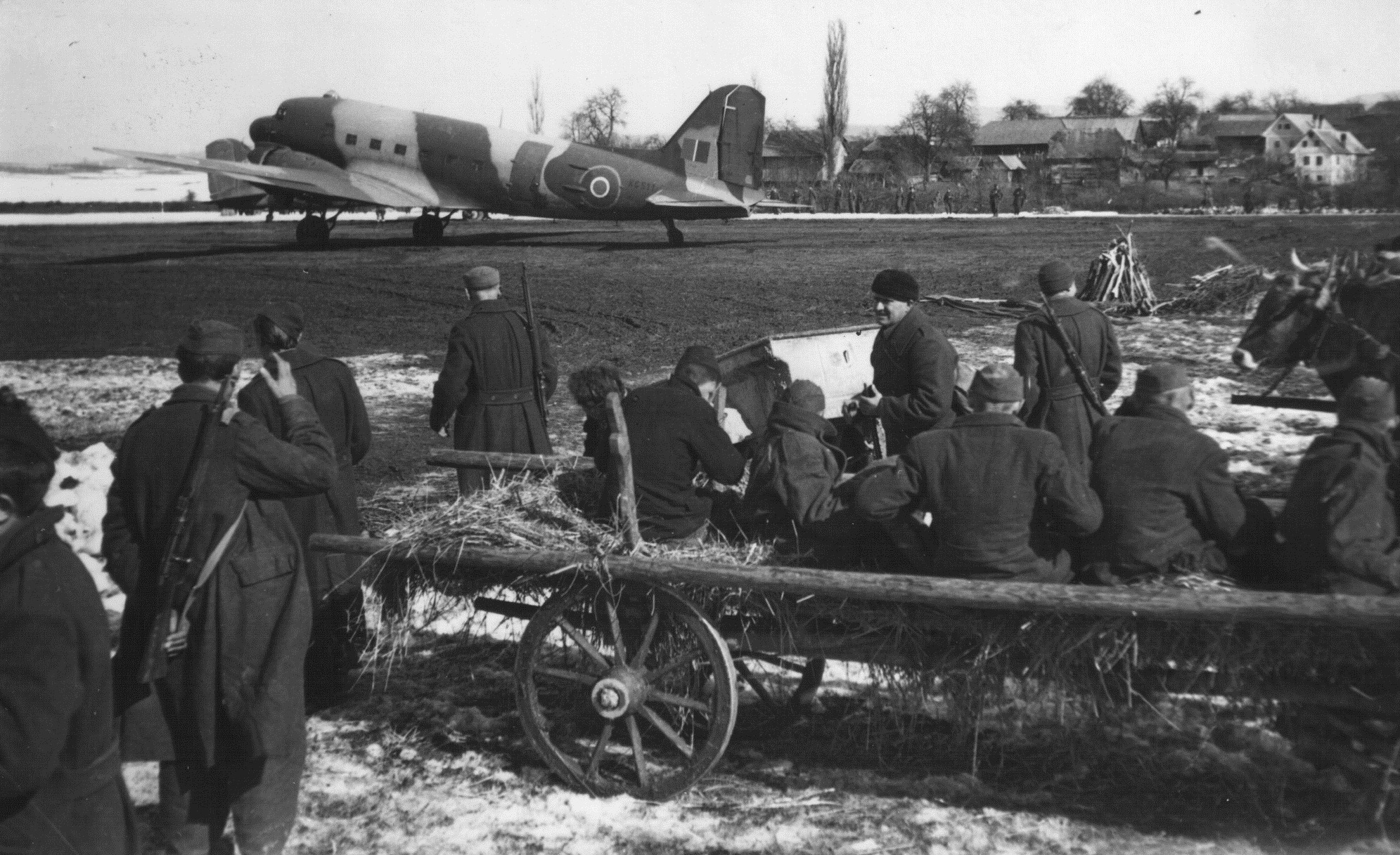 Evakuacija ranjenih partizanov iz Beleg Krajine v Italijo na letališču Otok.